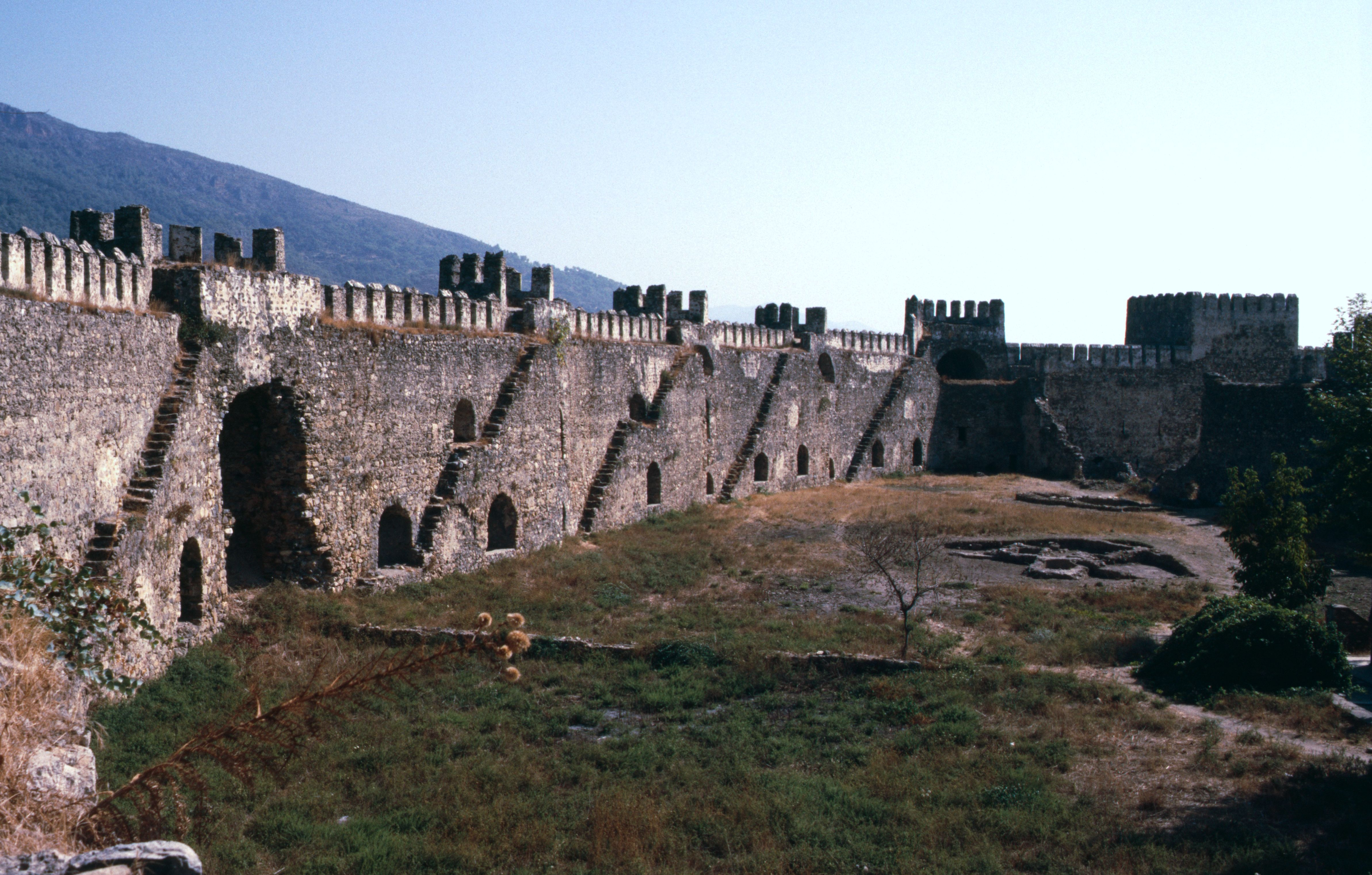 Innenhof von Mamure Kalesi 1988